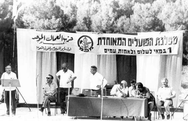 פעילות מפ"ם (מפלגת הפועלים המאוחדת) באחד במאי